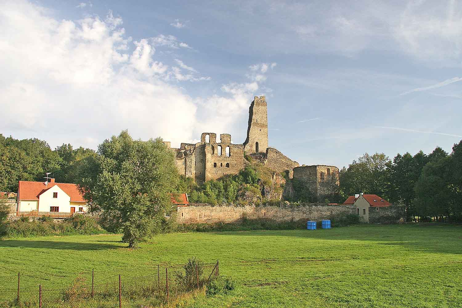 zřícenina hradu Okoř, district Praha-západ, Czech Republic autor:Prazak Date:2. 9. 2006